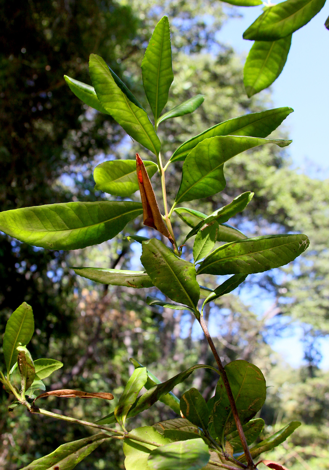 Hojas de Pitao (Pitavia punctata) en la Reserva Nacional Los Ruiles